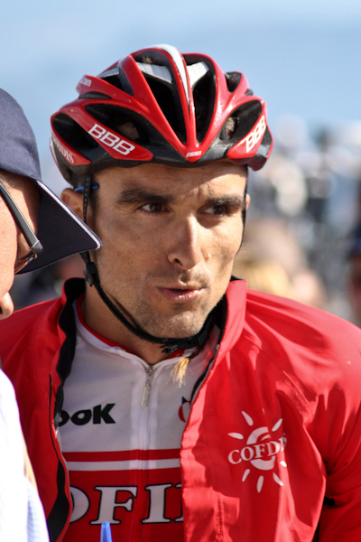 4e étape (Col du Grand Colombier) du Tour de l'Ain 2011